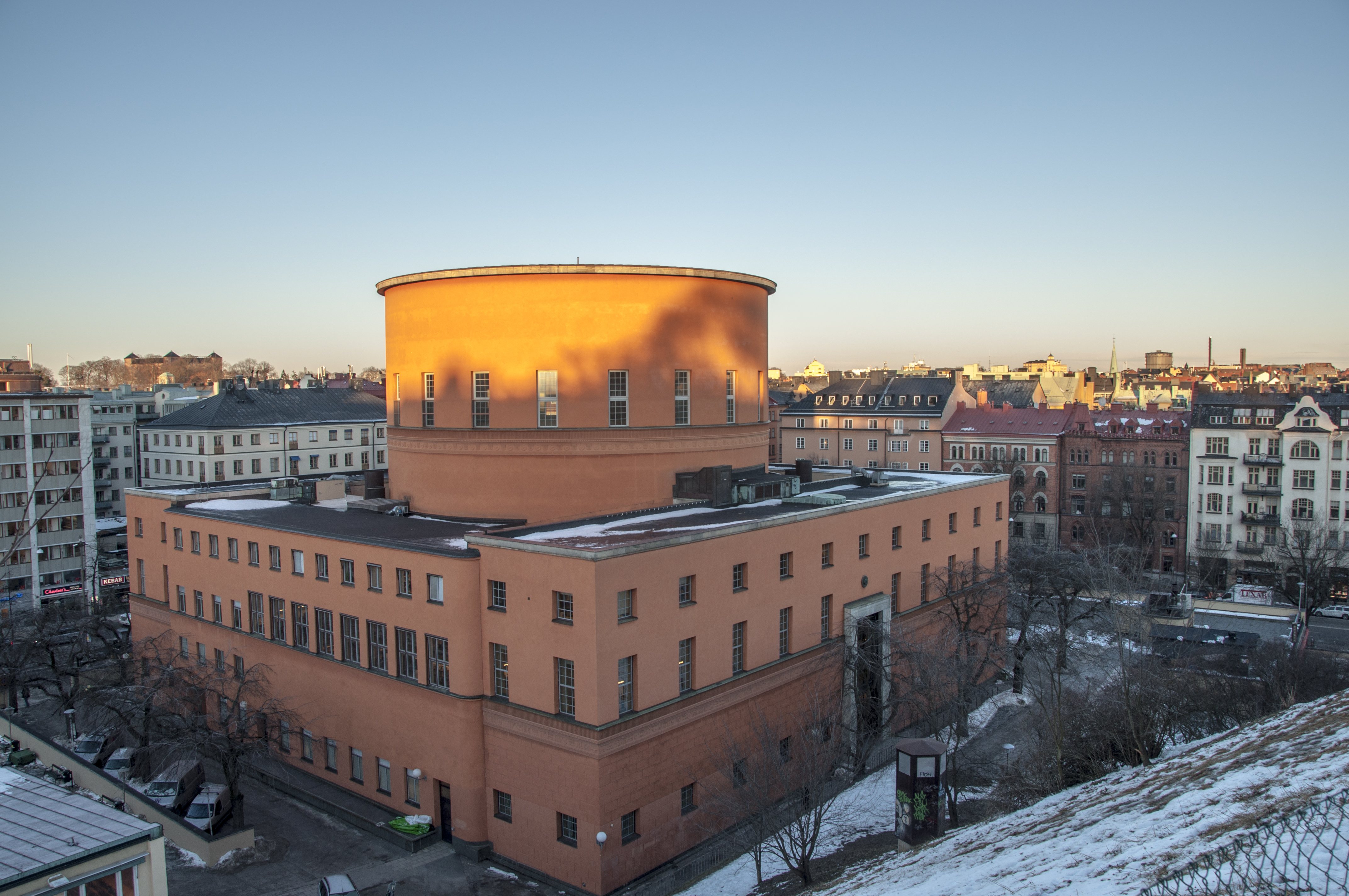 Stockholm Public Library 2011